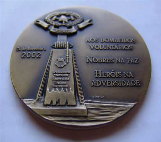 Medalha evocativa do Monumento ao Bombeiro da autoria do pintor e escultor Bottelho. Dedicada aos Bombeiros Voluntários de Belas, a medalha foi lançada a 24 de Novembro de 2002 e entregue solenemente ao secretário de Estado adjunto do Ministério da Administração Interna, presidente da Câmara de Sintra, pelo presidente da Junta de Freguesia. A estátua é um memorial inaugurado 35 anos decorridos da tragédia de 1967, quando fortes chuvadas fizeram transbordar o Rio Jamor, arrastando com ele vidas e bens.